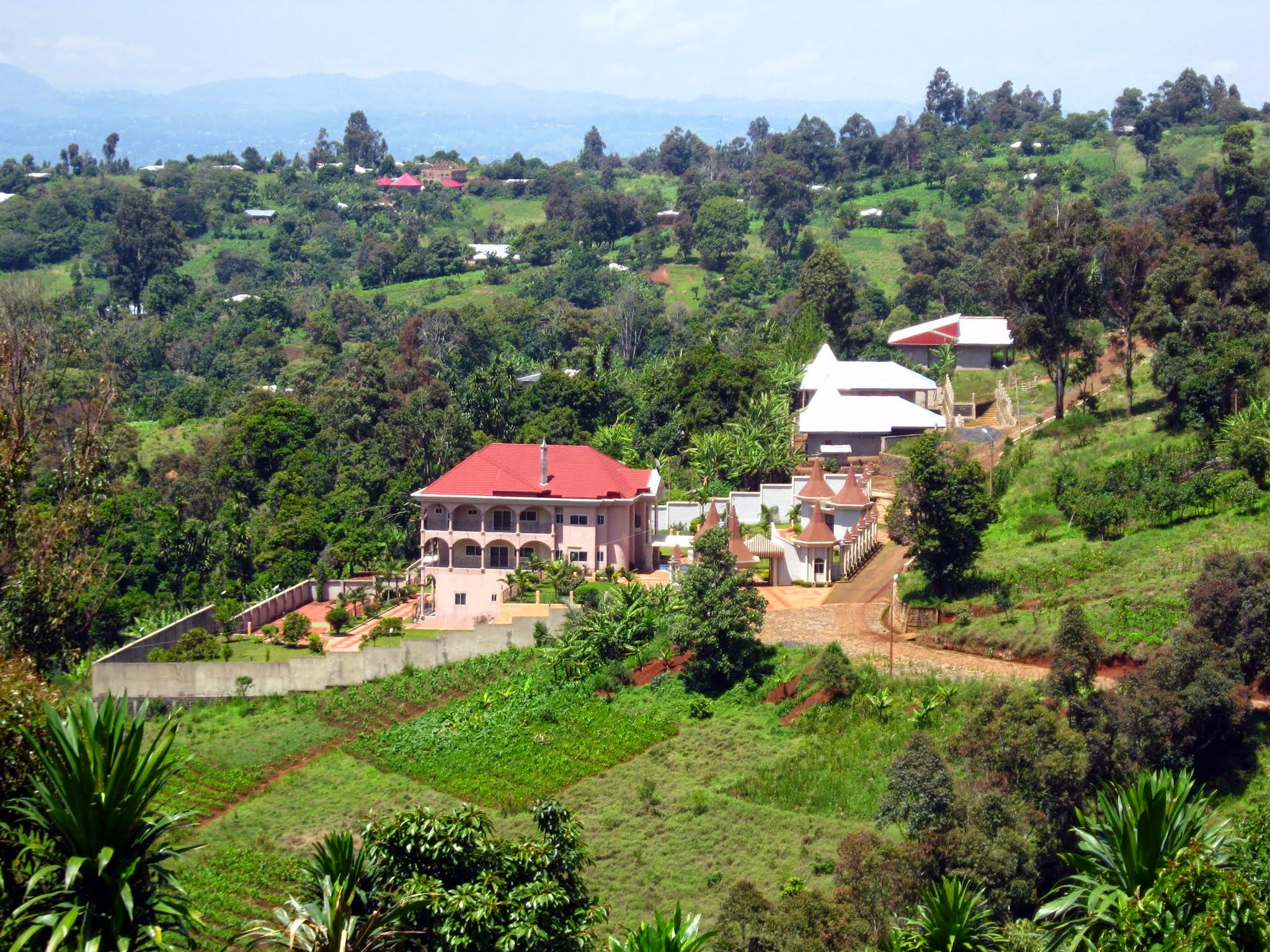 La résidence d'un homme d'affaires bangang surnommé "White", aux pieds du Mont Bamboutos.